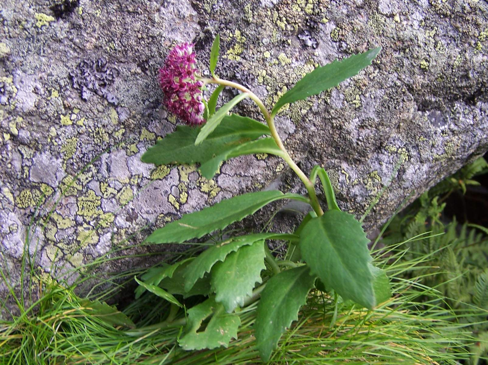 Sedum fabaria (pl. rozchodnik karpacki), habitat: Tatra Mountains, Dolina 5 Stawów Polskich